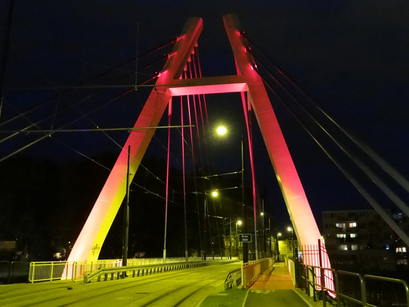 Most tramwajowy im. Władysława Jagiełły nad Brdą w Bydgoszczy